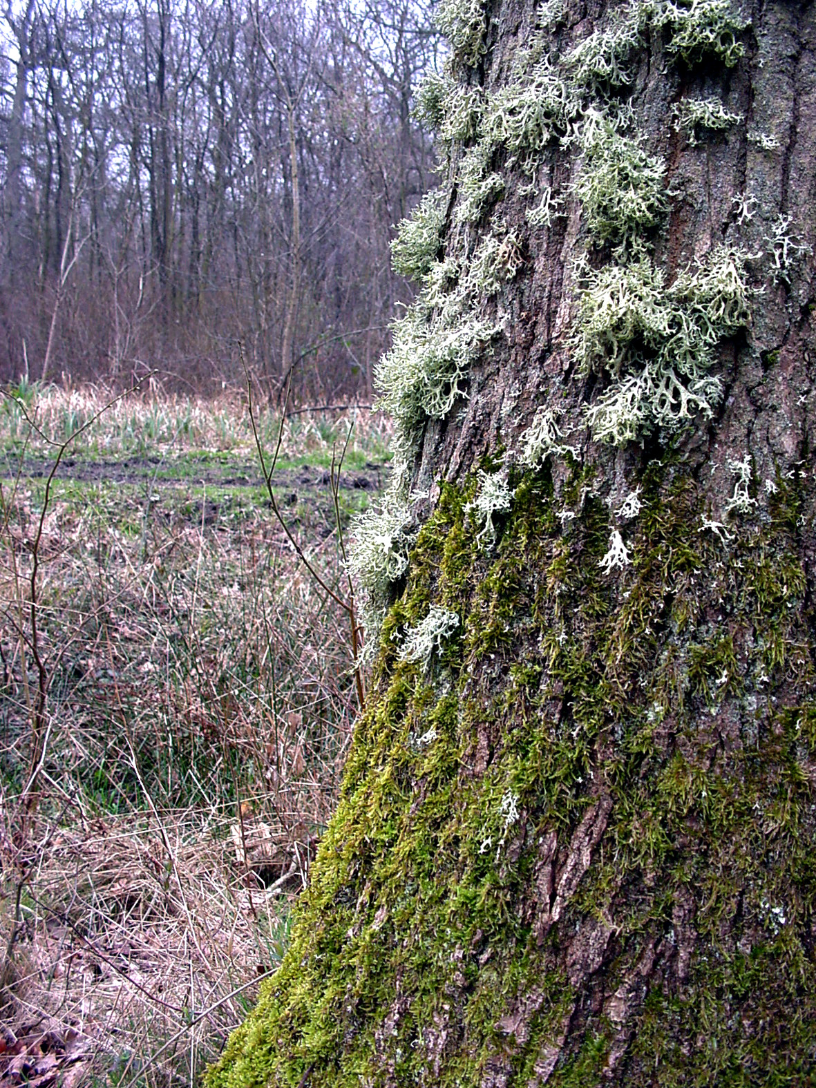 fr tronc couvert de mousses et lichens, Forêt de Clairmarais (Département du Pas de Calais, Nord de la France).